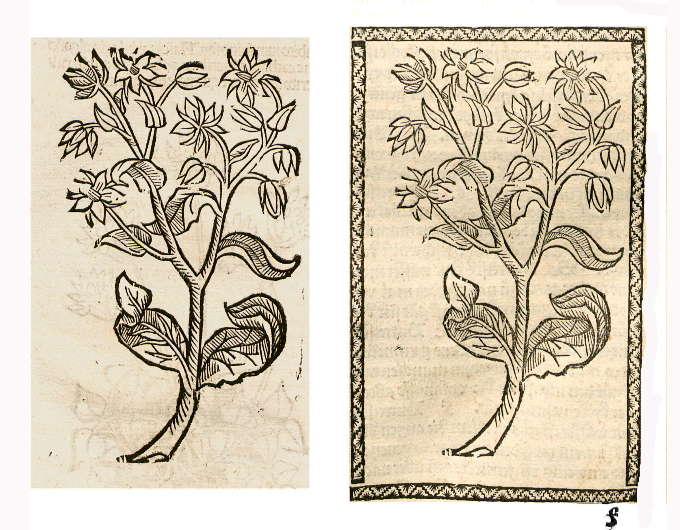 Abbildung von: Boretsch